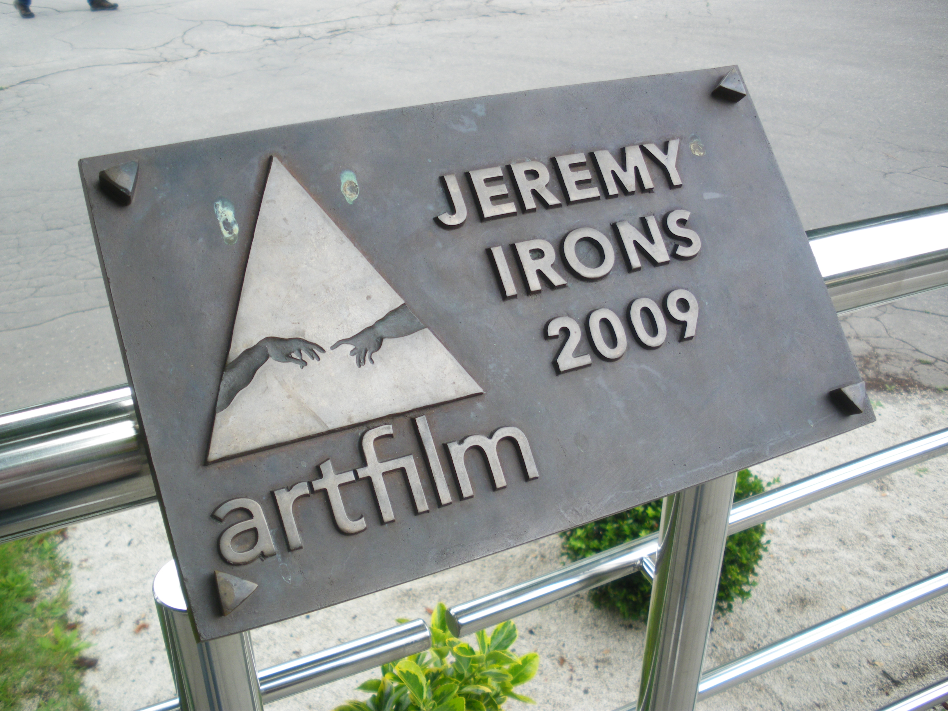 Mosadzná plaketa: „HERCOVA MISIA“ (Actor‘s Mission Award). Medzinárodný filmový festival Art Film Fest, Trenčianske Teplice 2009